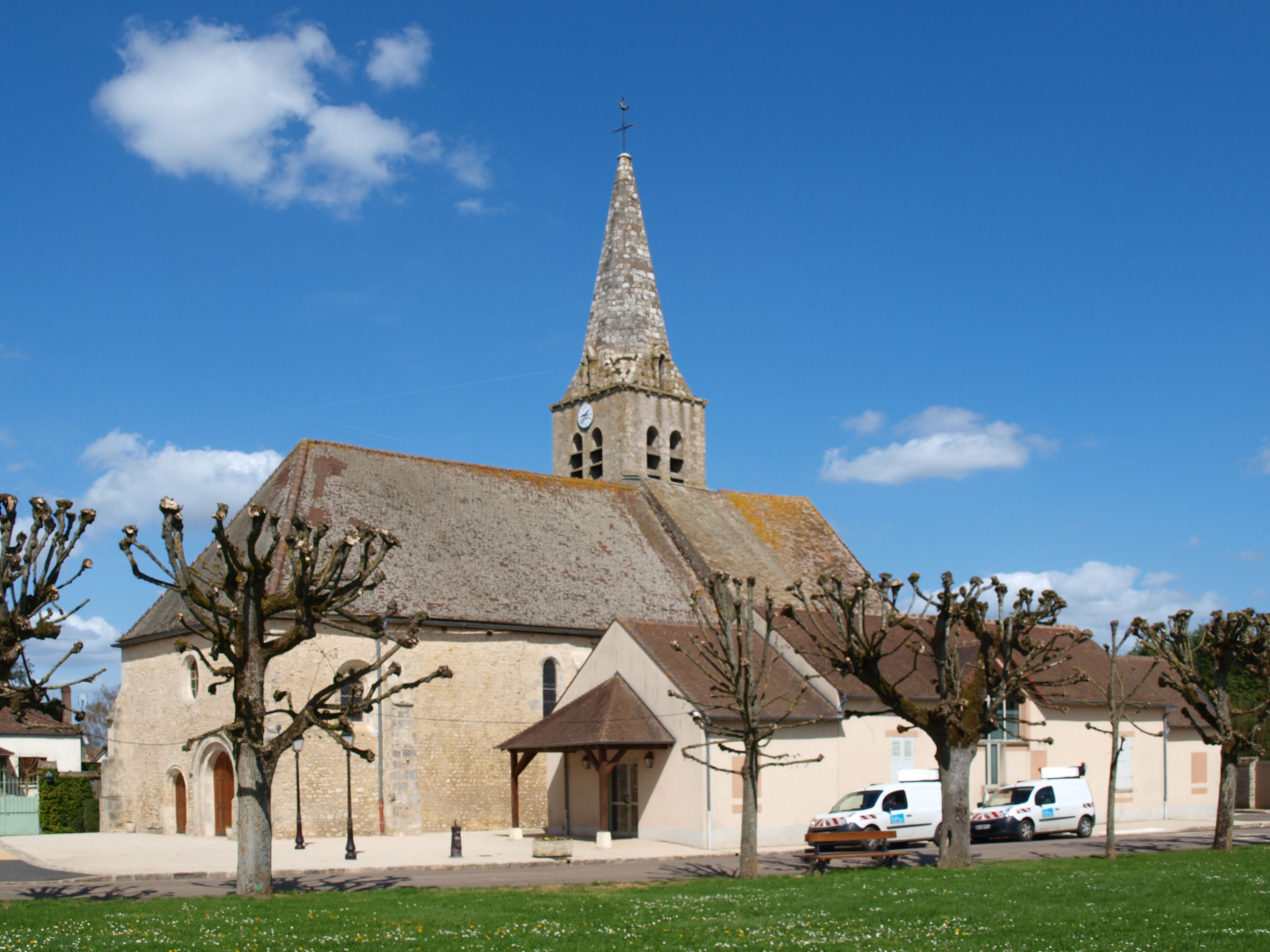 Saint-Escobille (Essonne, France) ; église